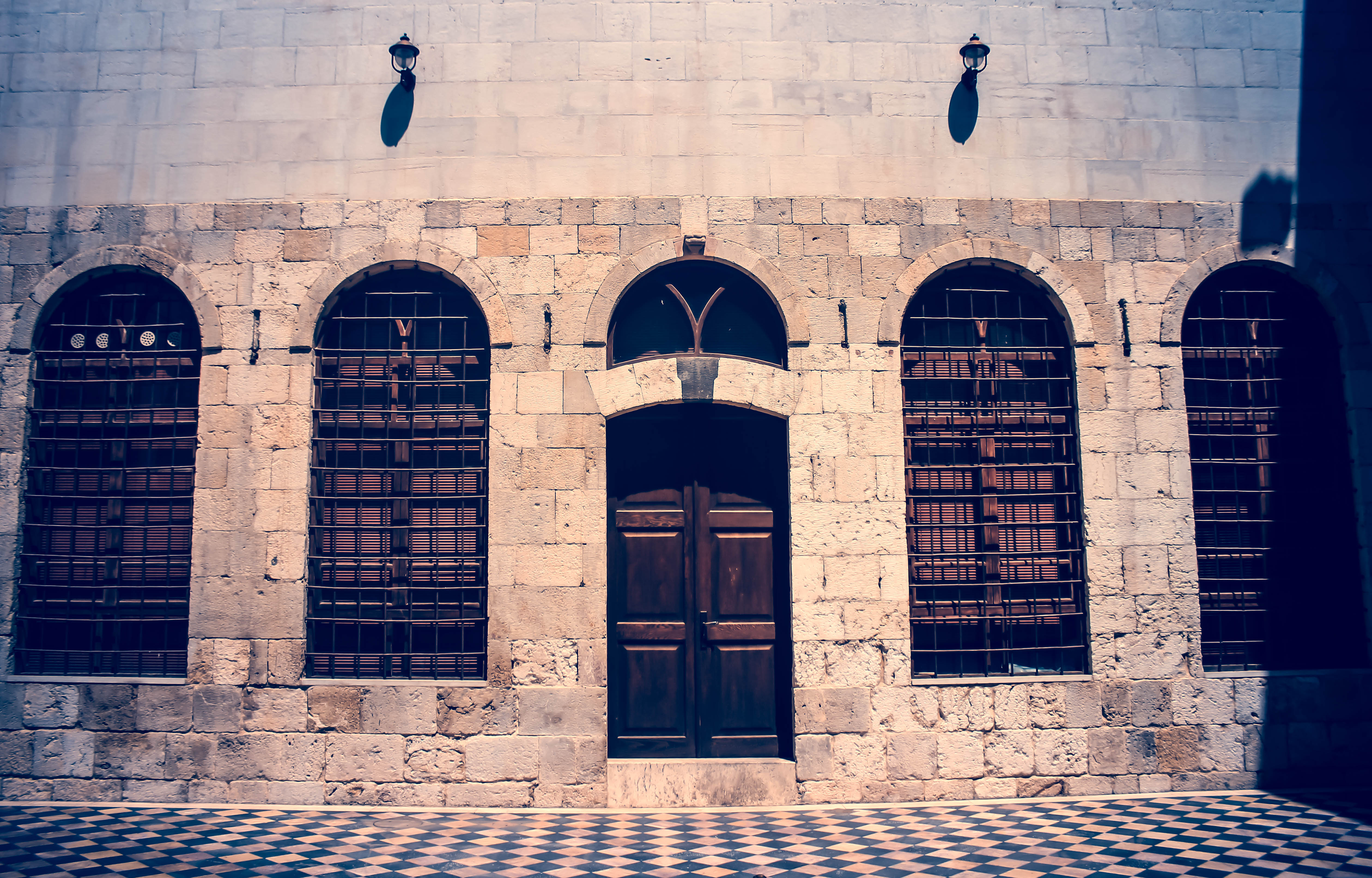 Damascus